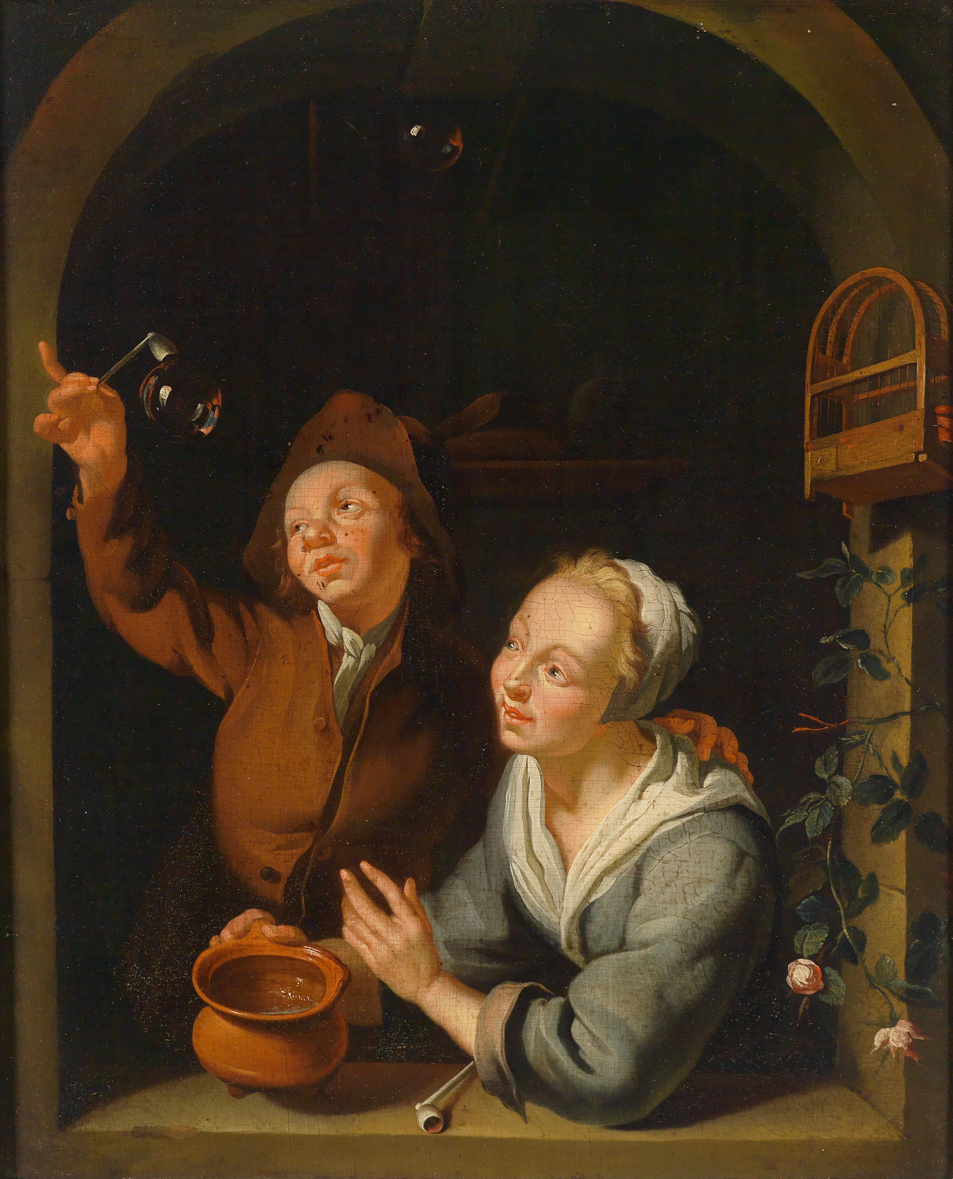 Ein junges Paar beim Herstellen von Seifenblasen